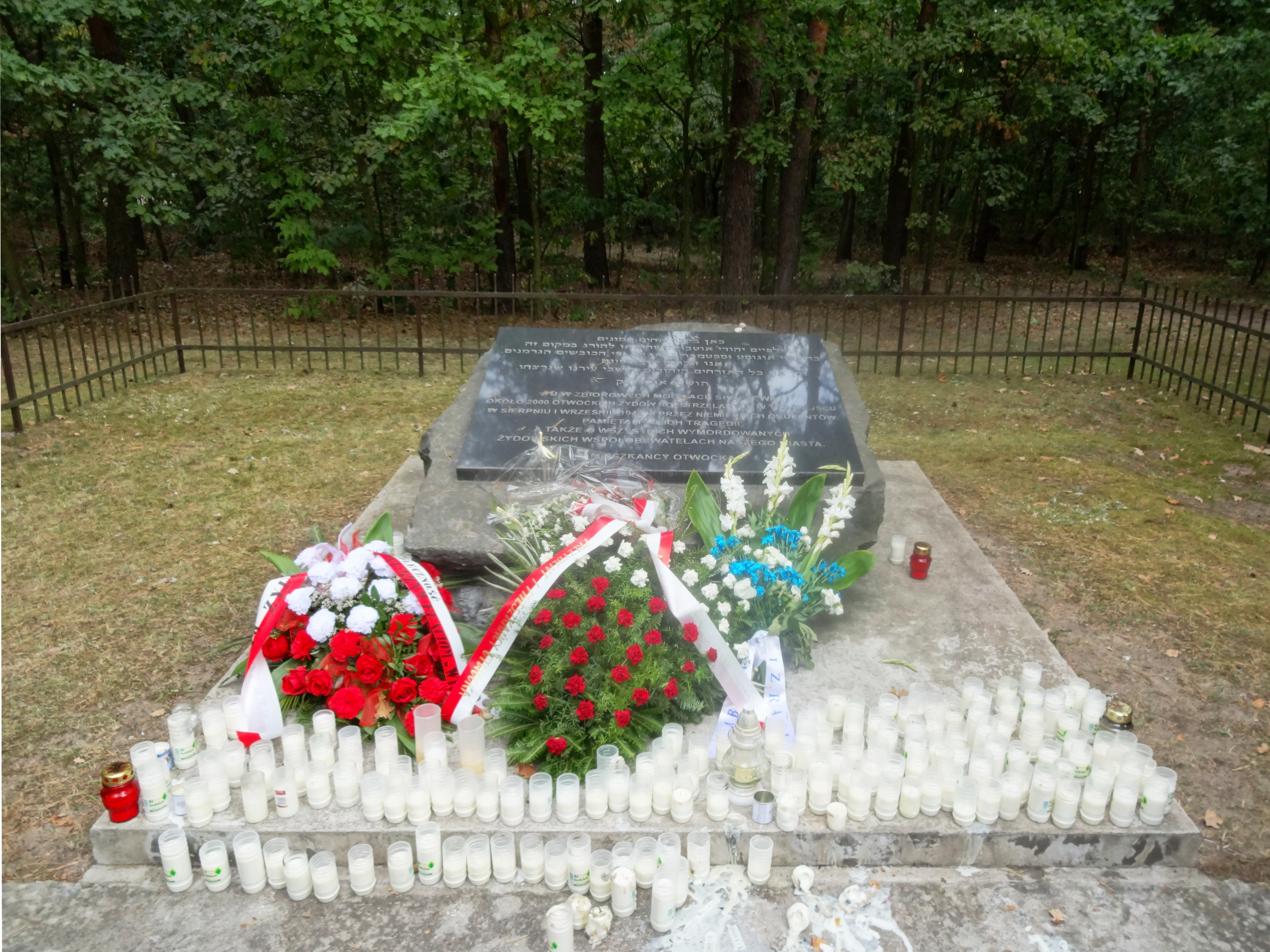 Kamień poświęcony pamięci otwockich Żydów